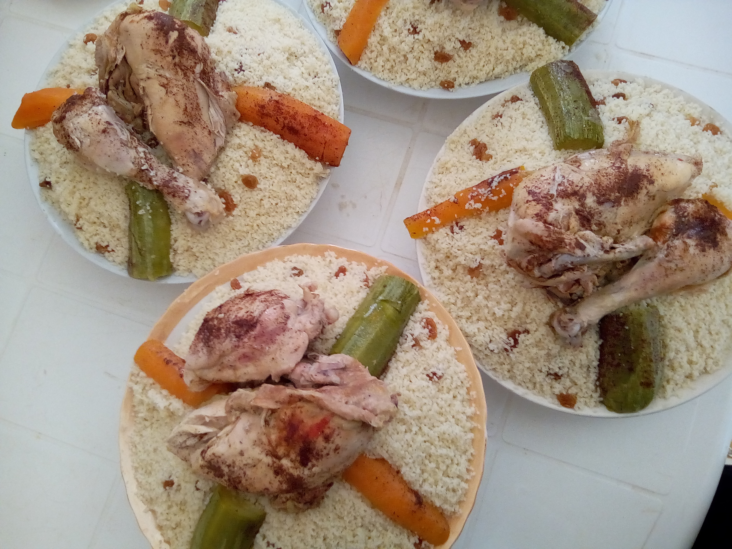 couscous avec légumes et poulet